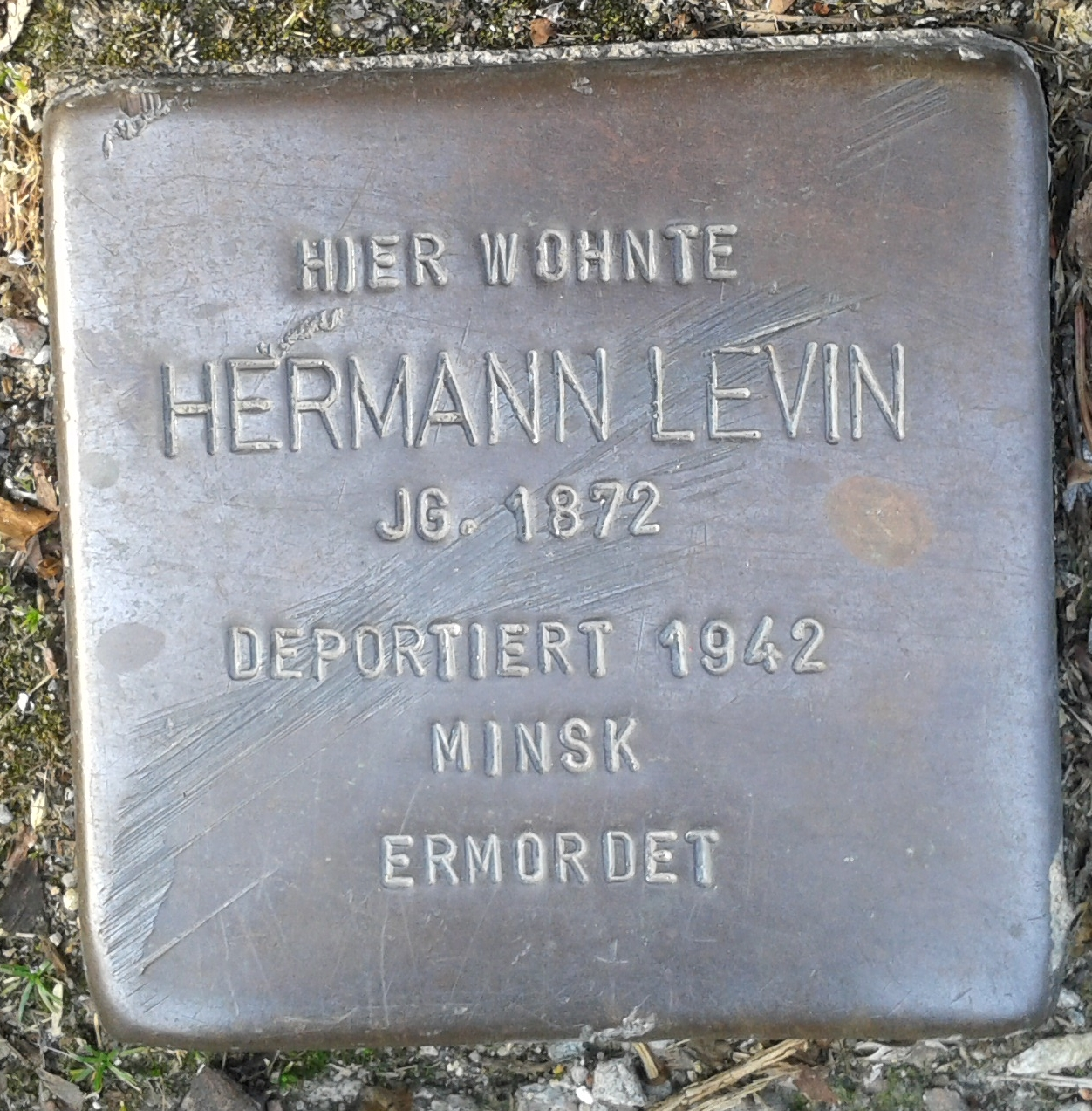 Stolperstein Selm Hauptstraße 34 Hermann Levin